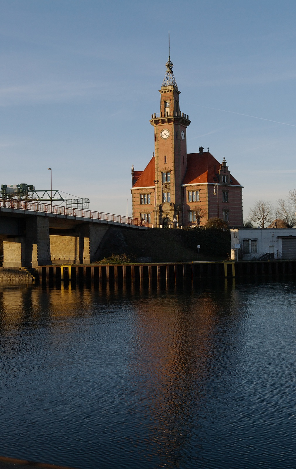 Hafenamt Dortmund, Spiegelung im Hafenbecken